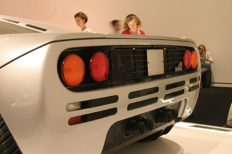 From Ralph Lauren's car collection.